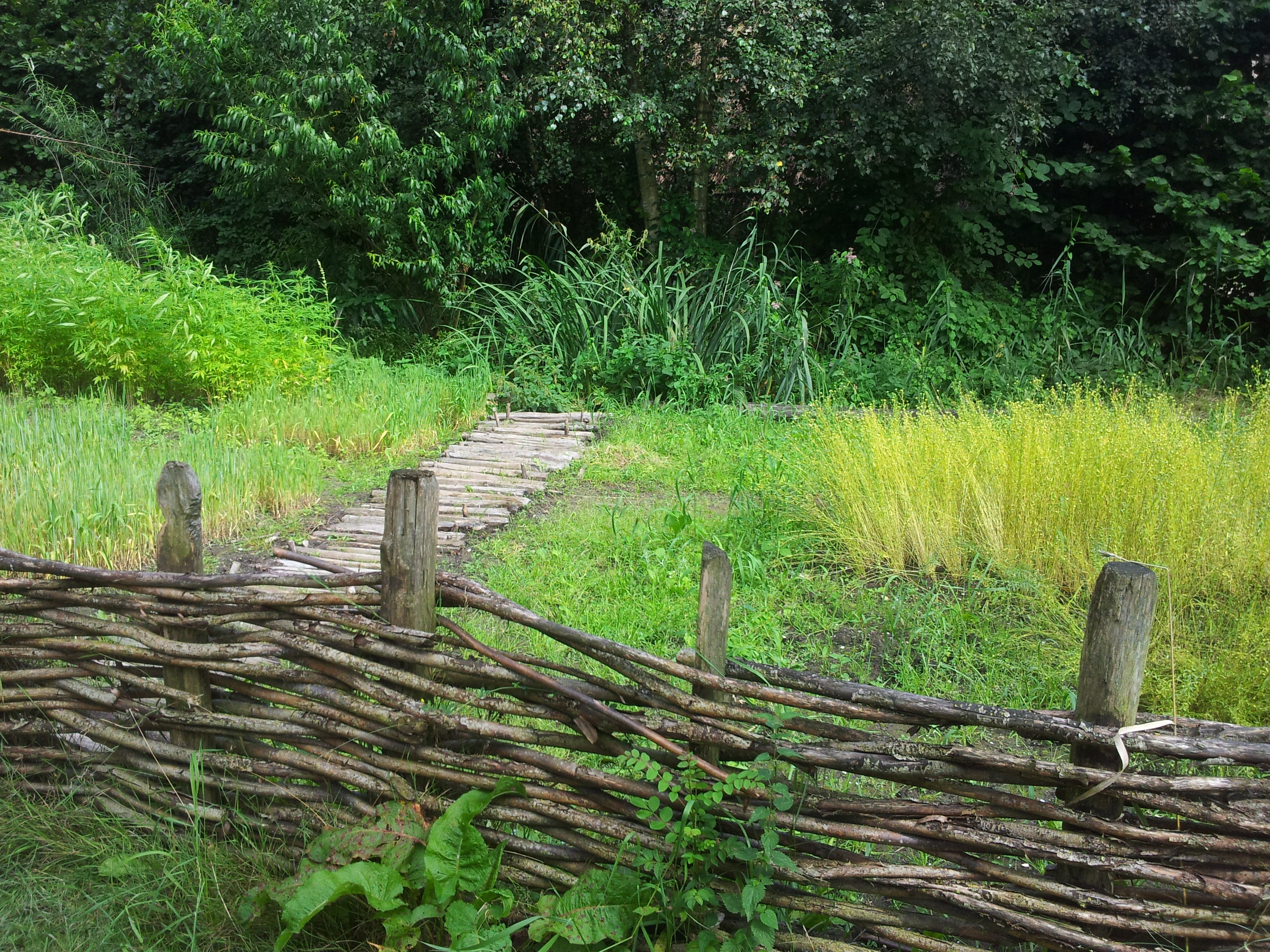 Knuppelpad, Archeon 2016. Op moerassige veengrond legden de inheemse bewoners van Nederland in de IJzertijd en de Romeinse tijd dit soort paadjes van houten palen aan.